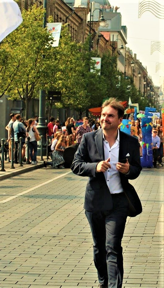 A. Vaišnys Universiteto eisenoje 2015.